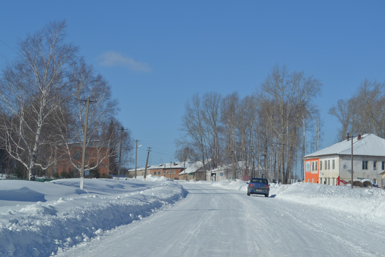 Улица Парковая в селе Кальтовка, Башкортостан